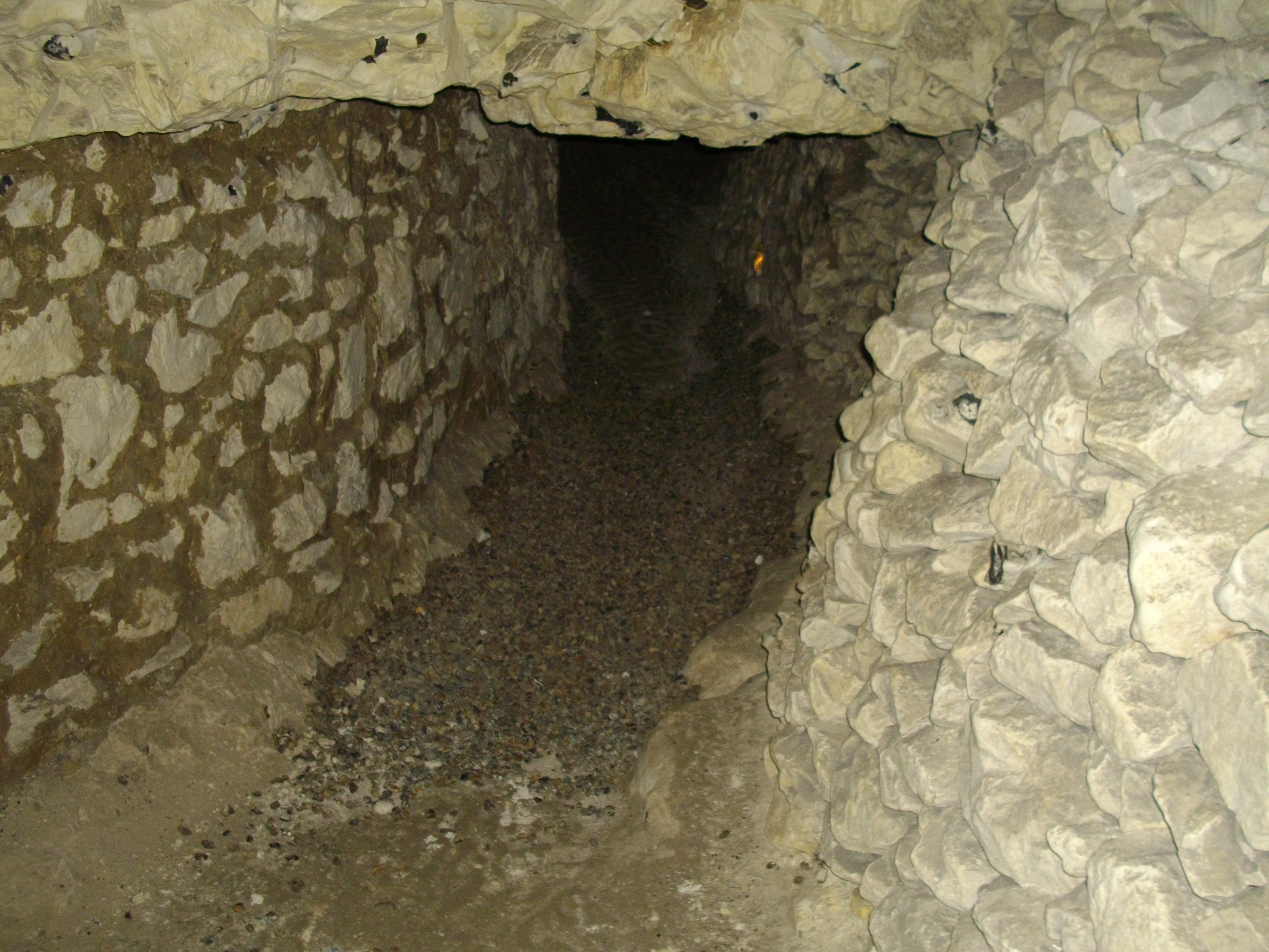 Grottes de Naours : passage aux graviers